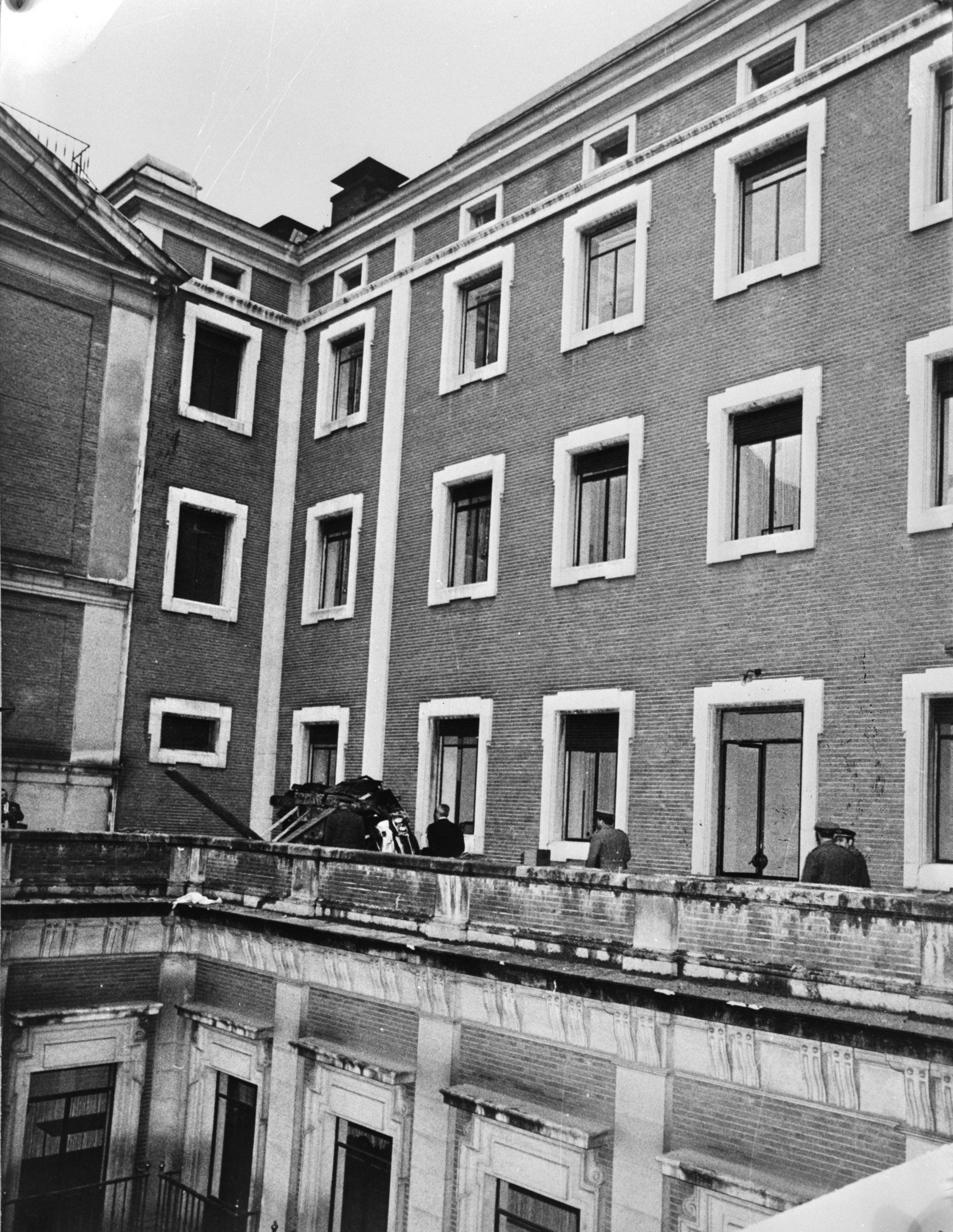 Collectie / Archief : Fotocollectie Anefo Reportage / Serie : [ onbekend ] Beschrijving : Aanslag op Spaanse president Blanco, auto waarin Blanco zat voor bomexplosie op balkon van 3e verdieping van gebouw in Madrid Datum : 31 mei 1974 Locatie : Madrid Trefwoorden : Autos, aanslagen, balkons, gebouwen, presidenten Fotograaf : [onbekend] Auteursrechthebbende : Nationaal Archief Materiaalsoort : Negatief (zwart/wit) Nummer archiefinventaris : bekijk toegang 2.24.01.04 Bestanddeelnummer : 927-2283